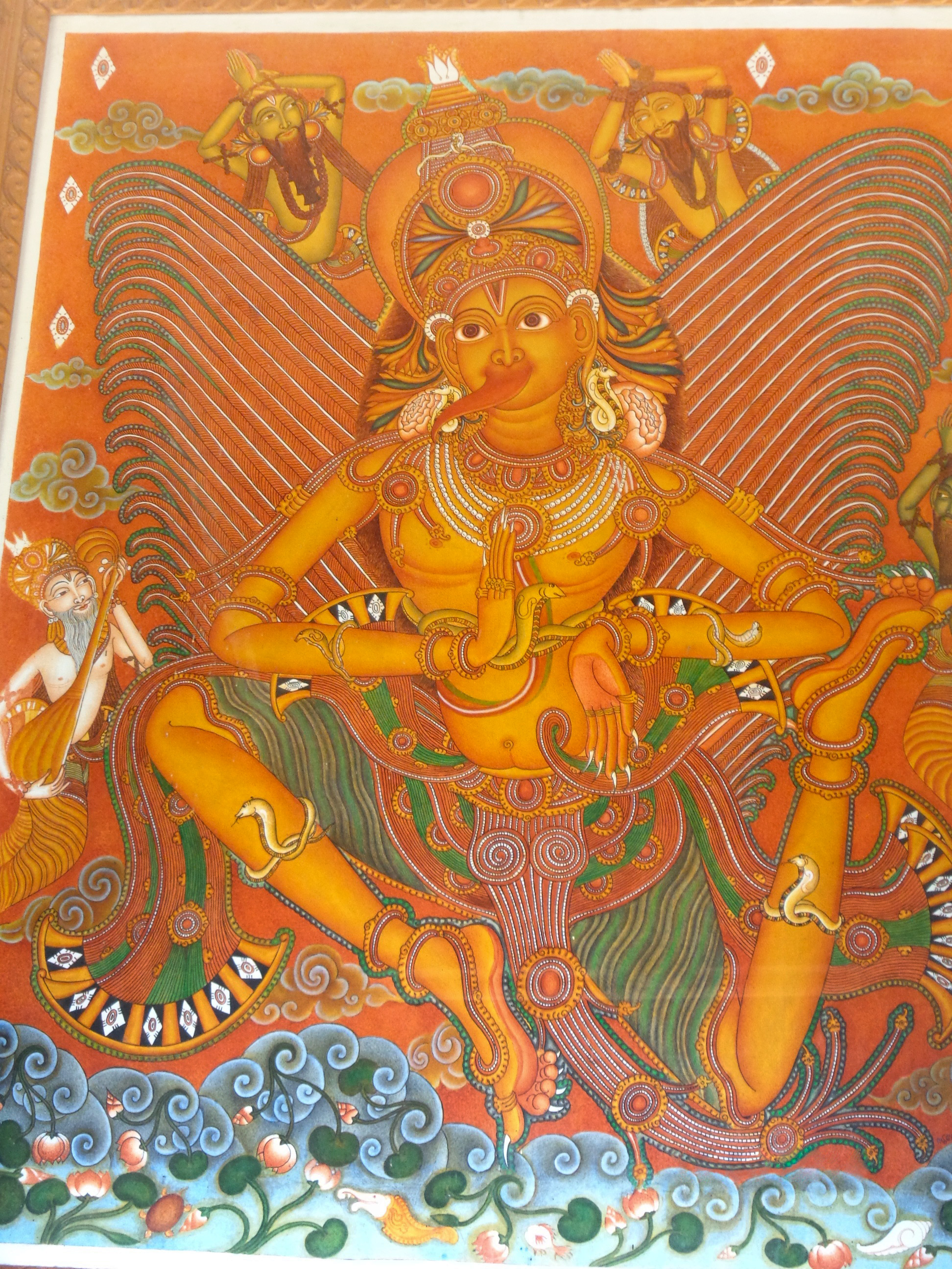 garuda picture sreevallabha temple, thiruvalla